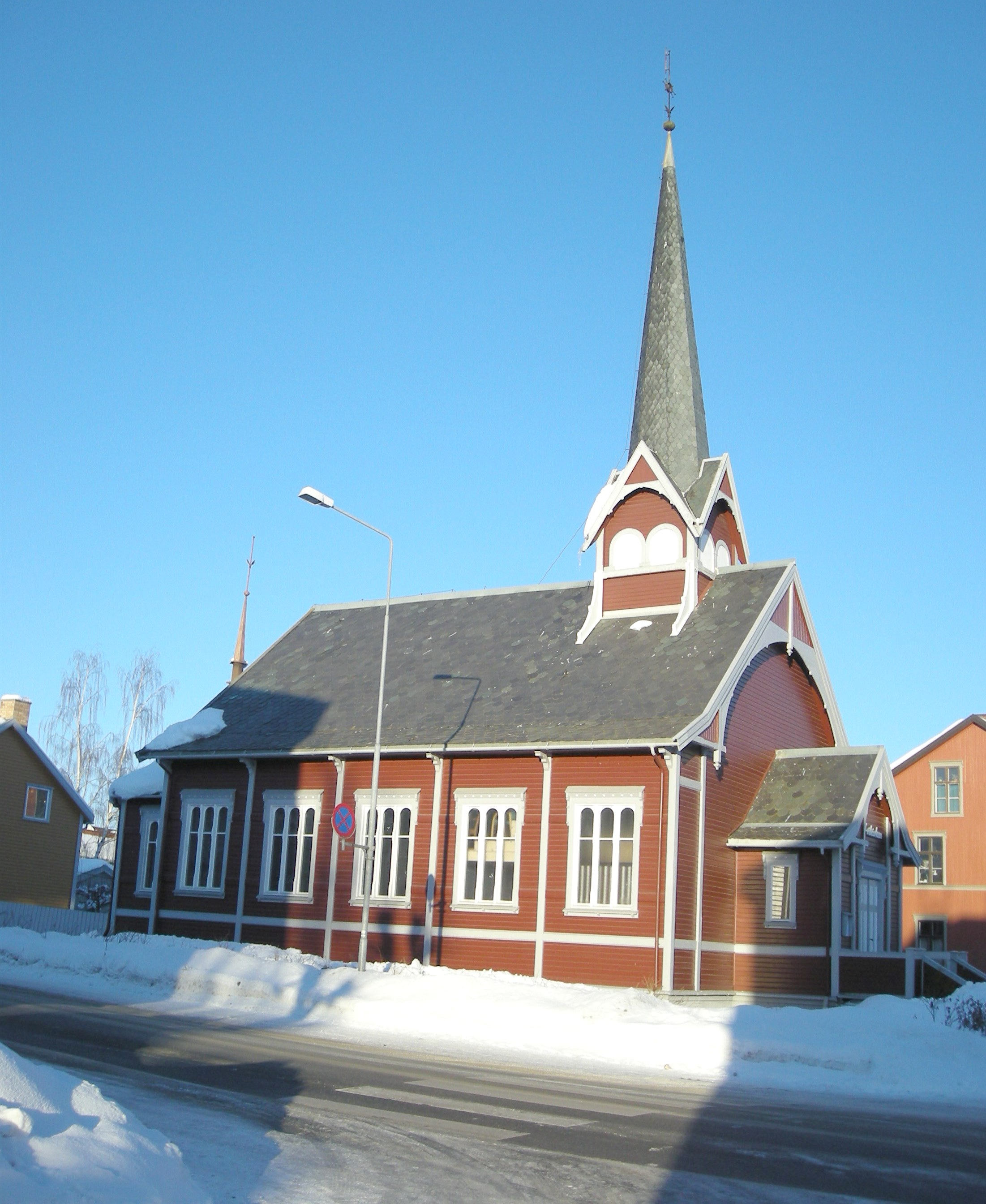 Hamar frikirke ligger ved Skolegata (fylkesvei 183).